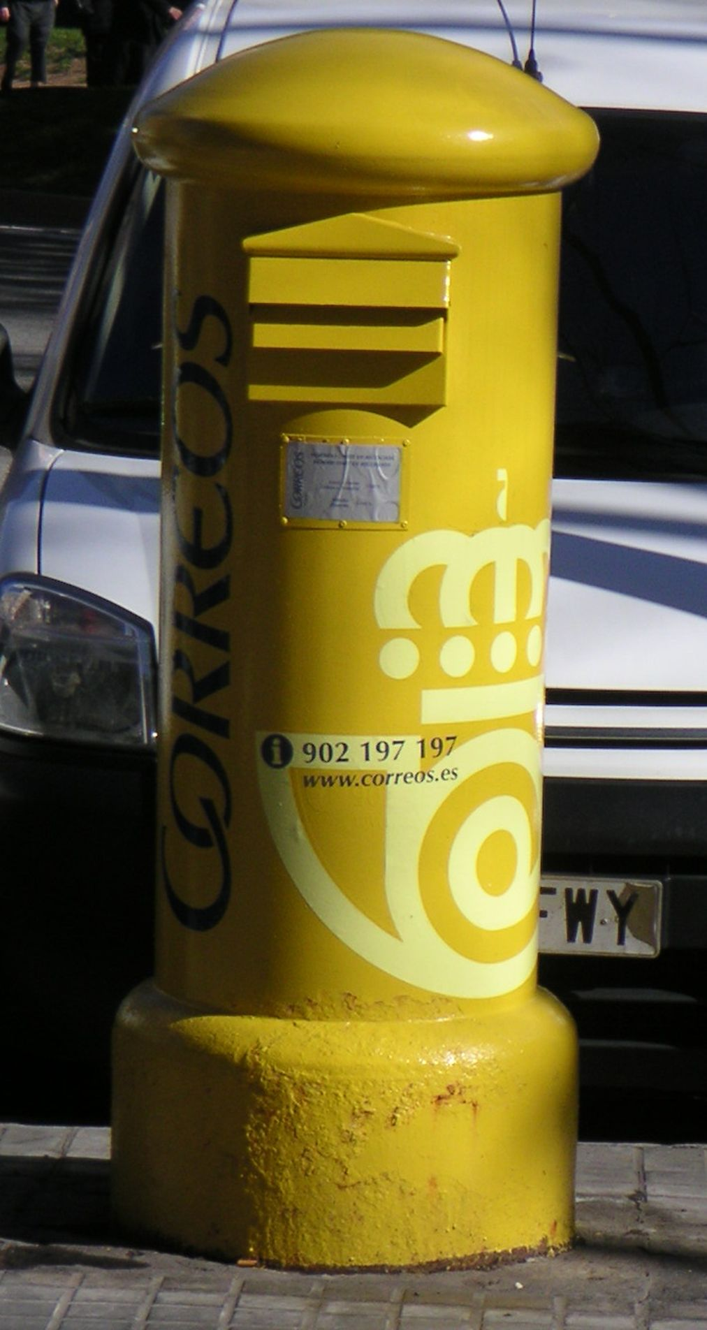 Bústia groga a Barcelona.